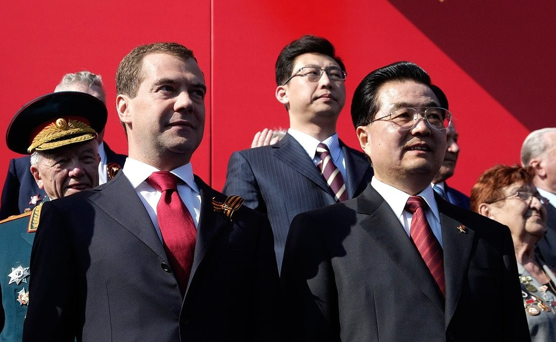 На военном параде, посвящённом 65-летию Победы в Великой Отечественной войне. Справа Председатель КНР Ху Цзиньтао.